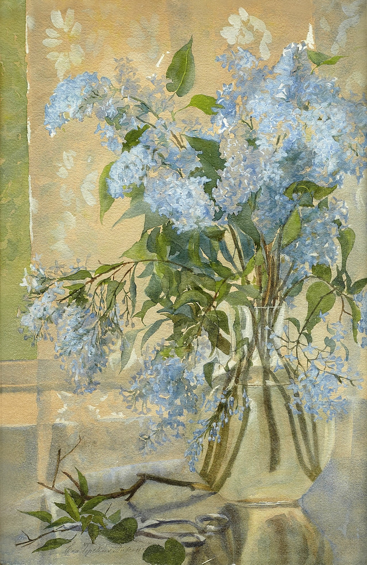 "Syrener" av Eva Acke